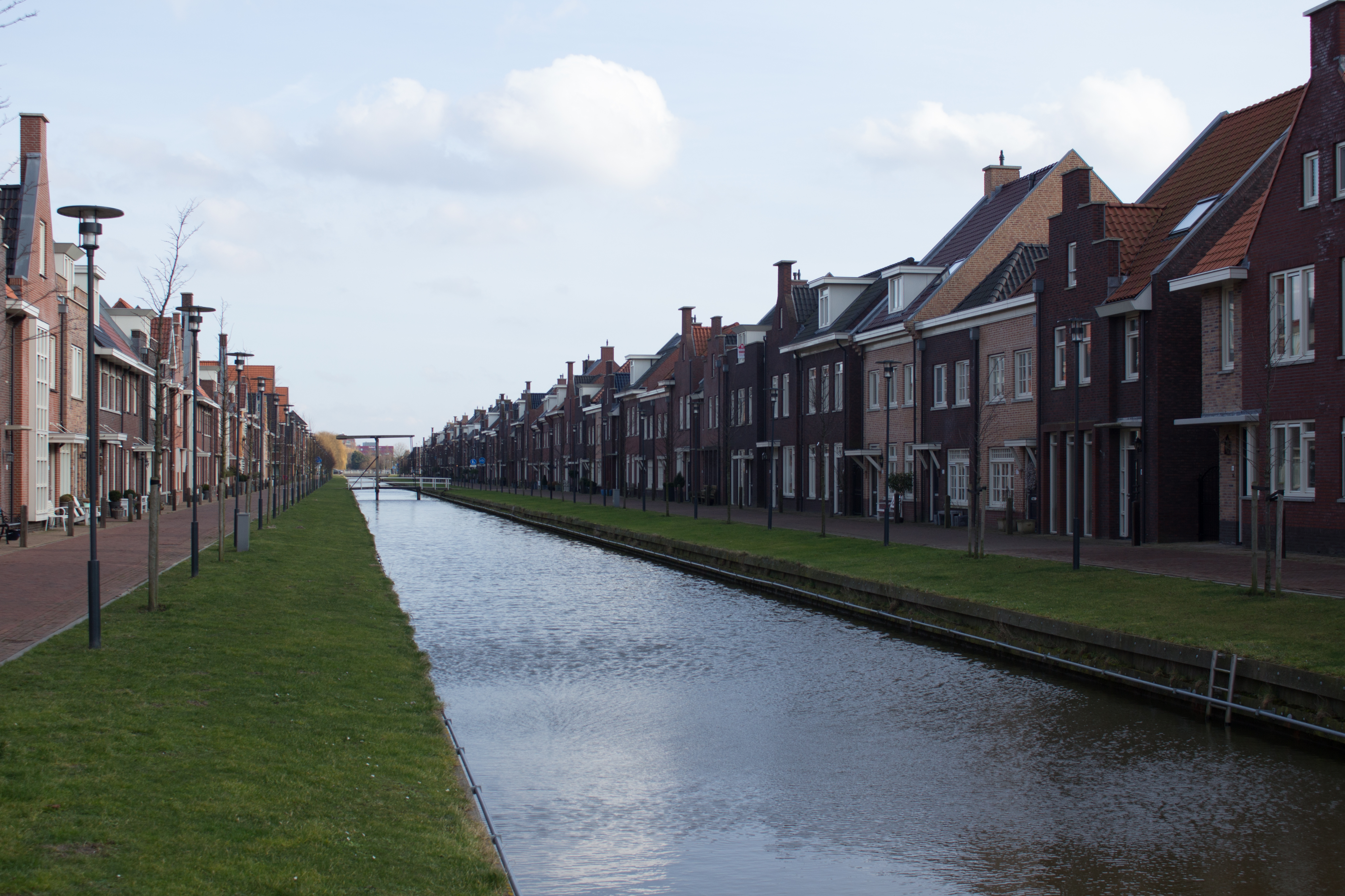 Zilvergracht, vinexwijk